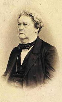 Carl Vilhelm Elberling (1800-1870)